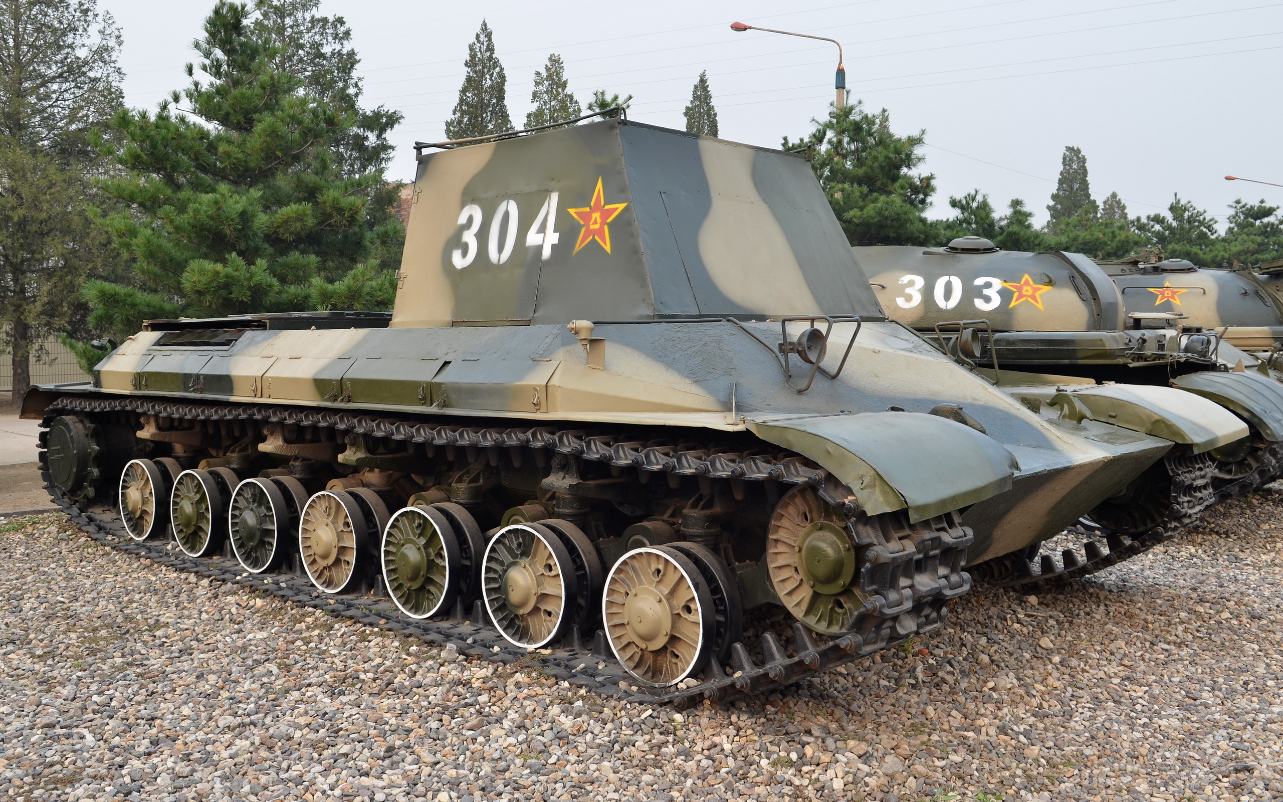 111重型坦克底盘试验样车. 中国于1960年代试制, 研制项目中途停止. 唯一的试验样车保存在坦克博物馆.